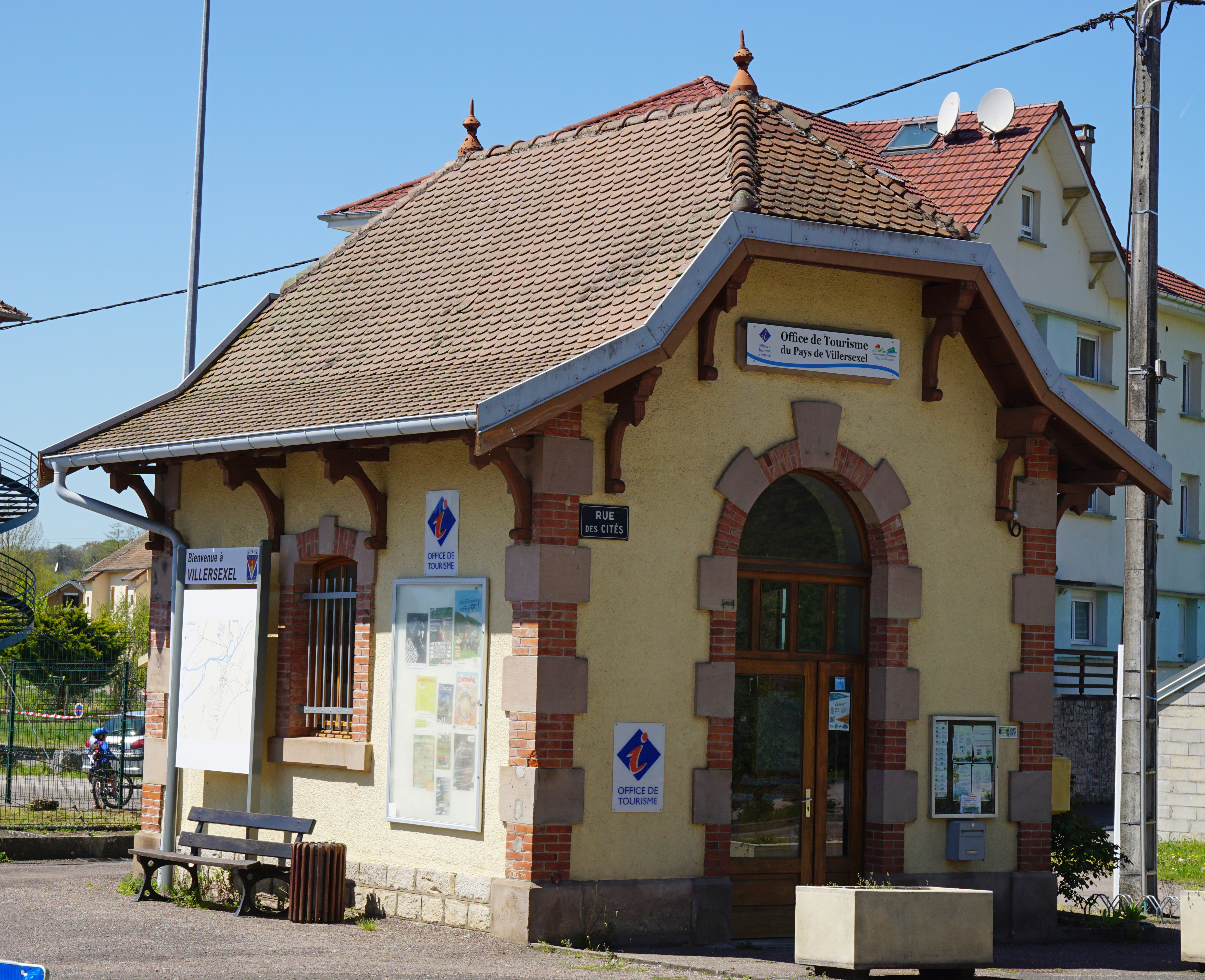 L'office de tourisme de Villersexel.